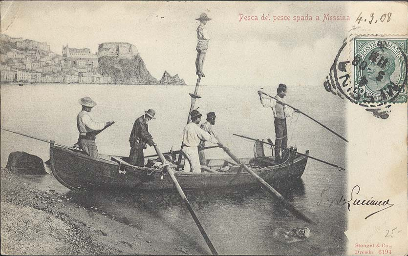 Cartolina dei primi del Novecento di Messina.